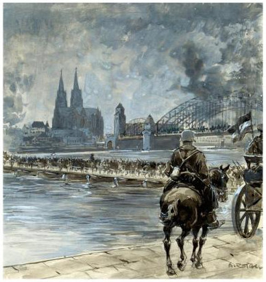 Albert Reich (1881–1942) – "Im Felde Unbesiegt" (1918)